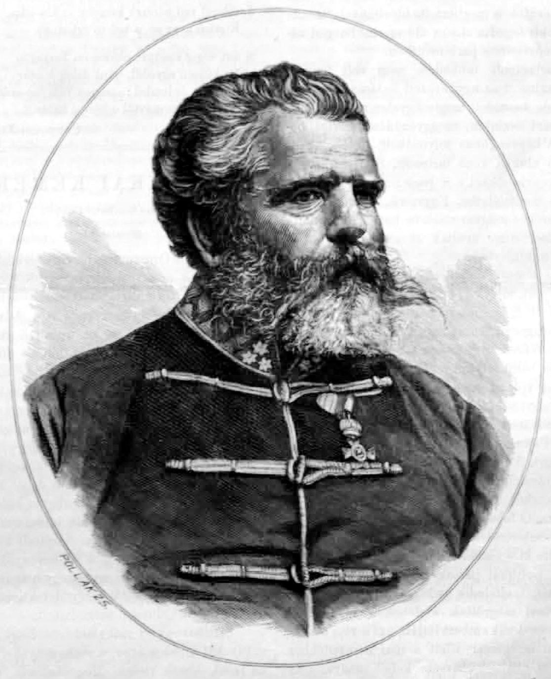 Szende Béla, 1839-ig Frummer Béla (1823–1882) honvéd százados Krassó vármegye alispánja, országgyűlési képviselő, honvédelmi miniszter (1872–1882) portréja. Pollák Zsigmond metszete (1882)